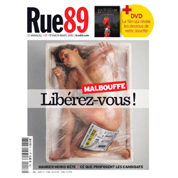 Photo Pascal Colrat